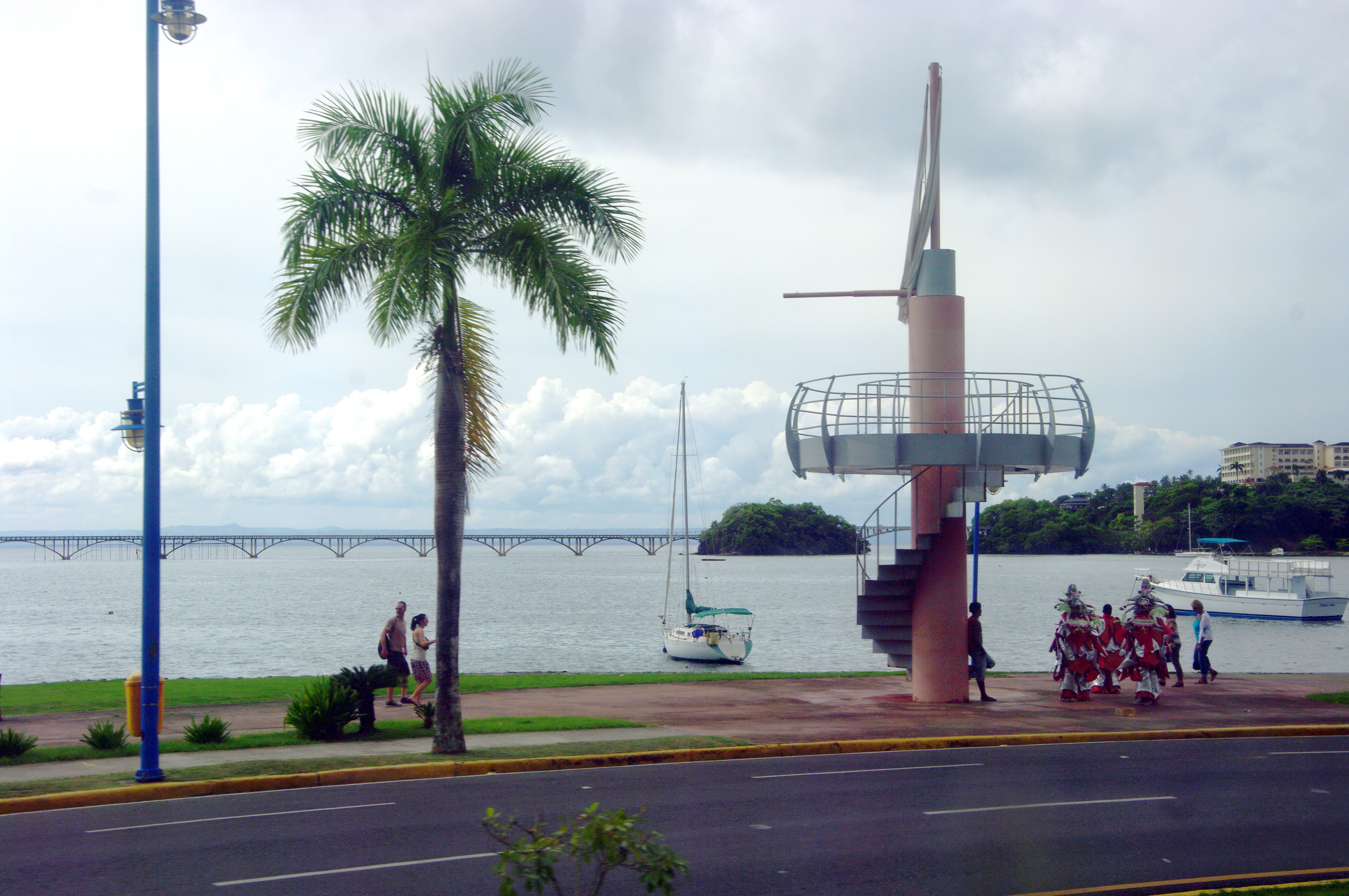 An der Uferpromenade Samaná